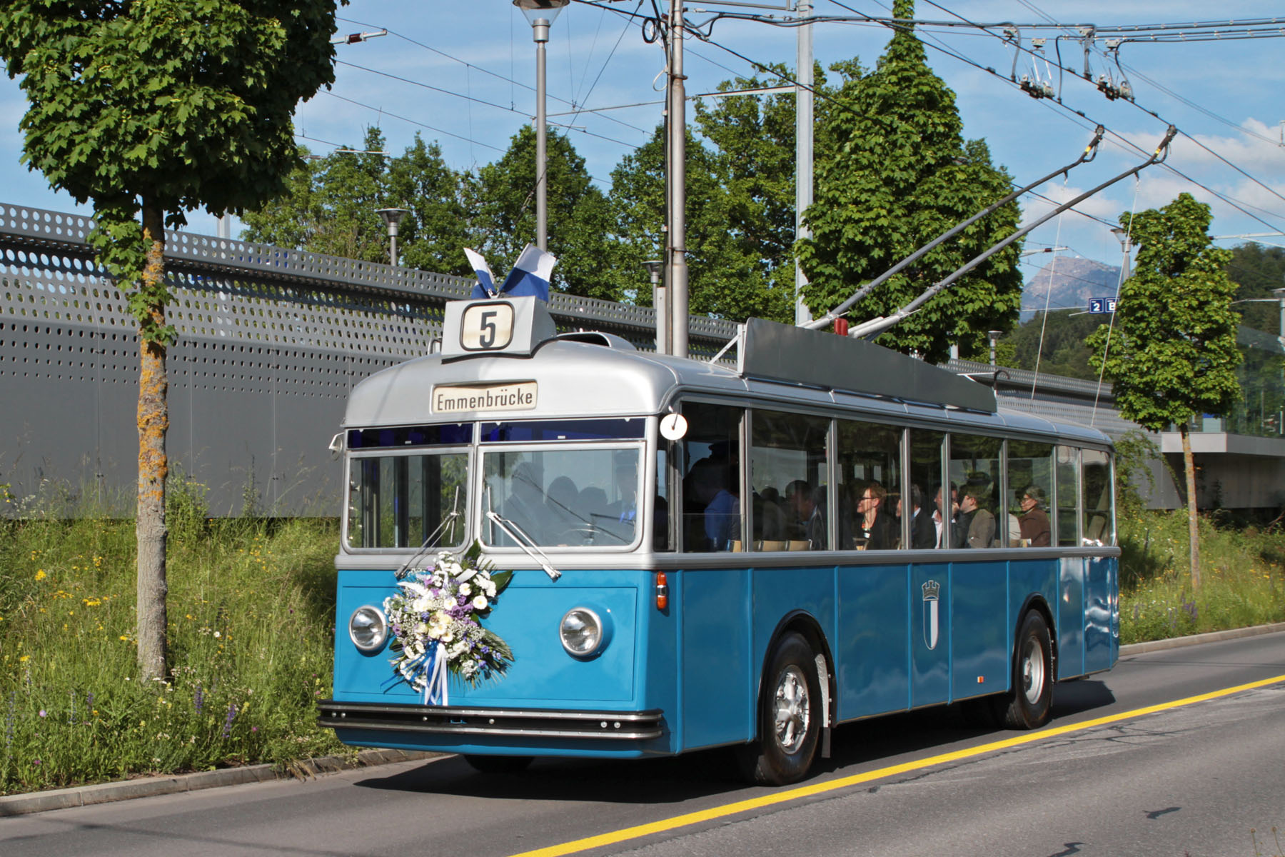 Der FBW/FFA/MFO Trolleybus Nr. 25 (1949) der Verkehrsbetriebe Luzern auf einer Extrafahrt zum 75-jährigen Bestehen des Trolleybusnetzes im Jahr 2016